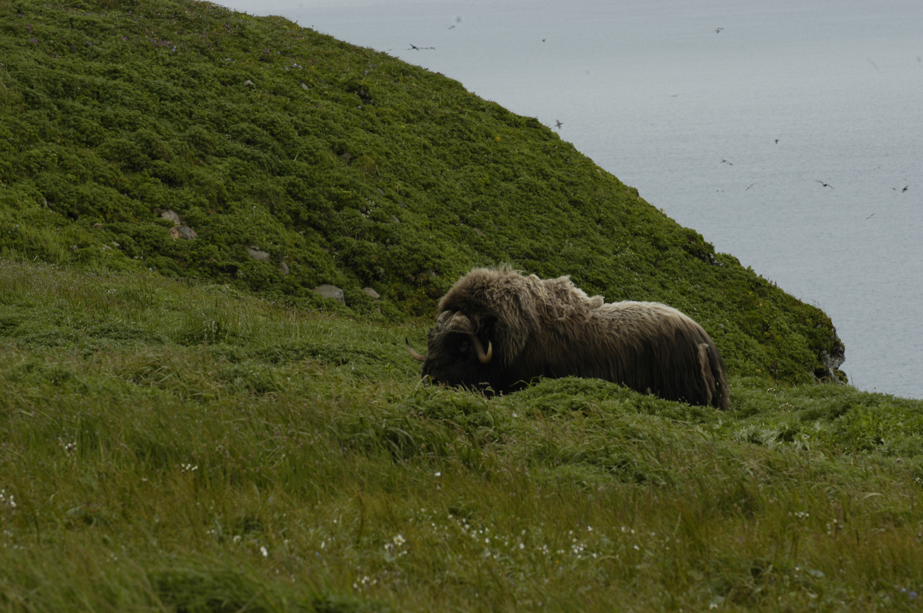 Musk ox grazing on Nunivak Island